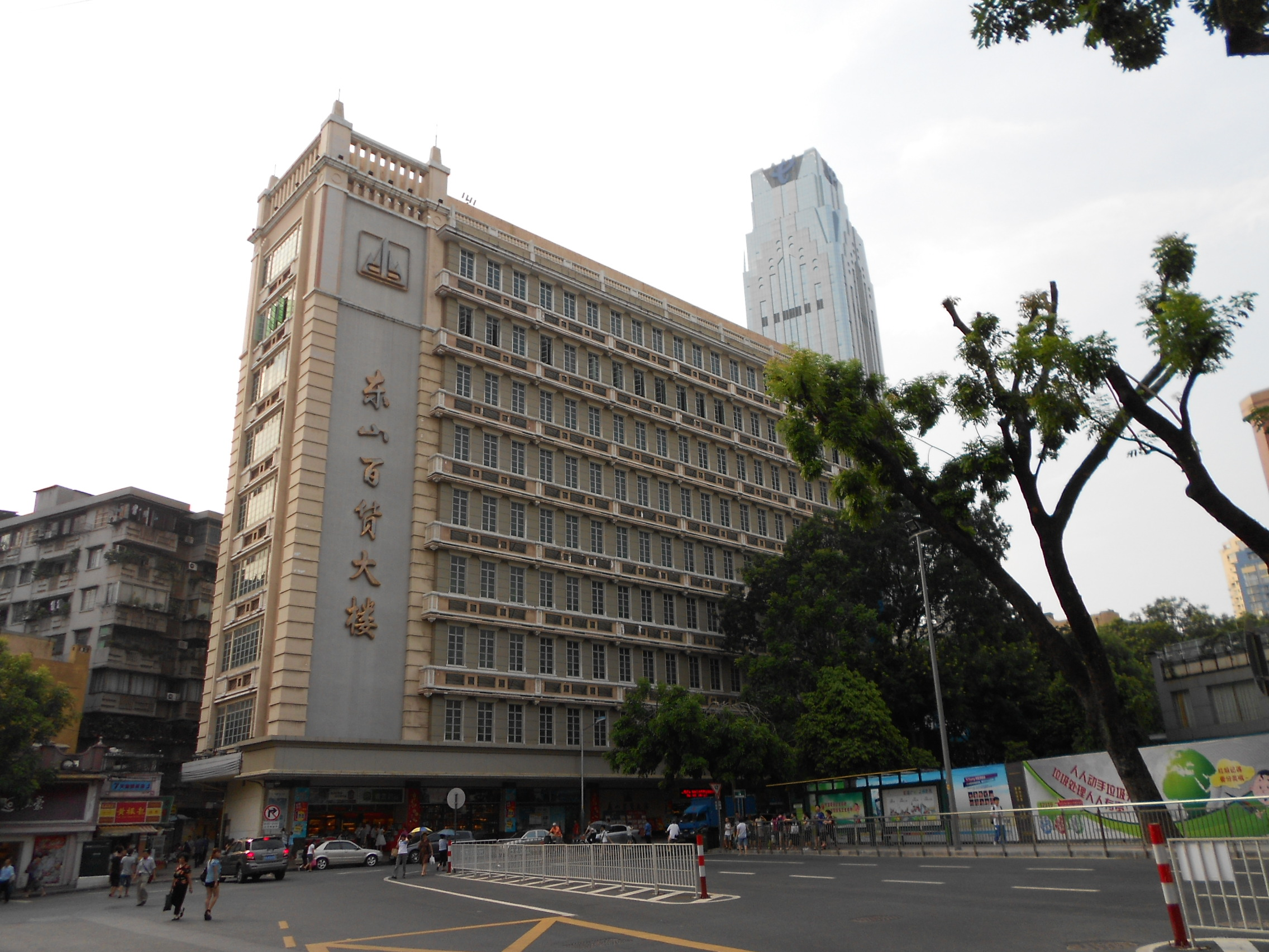 東山百貨大樓